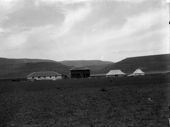 דגניה - בראשיתה.